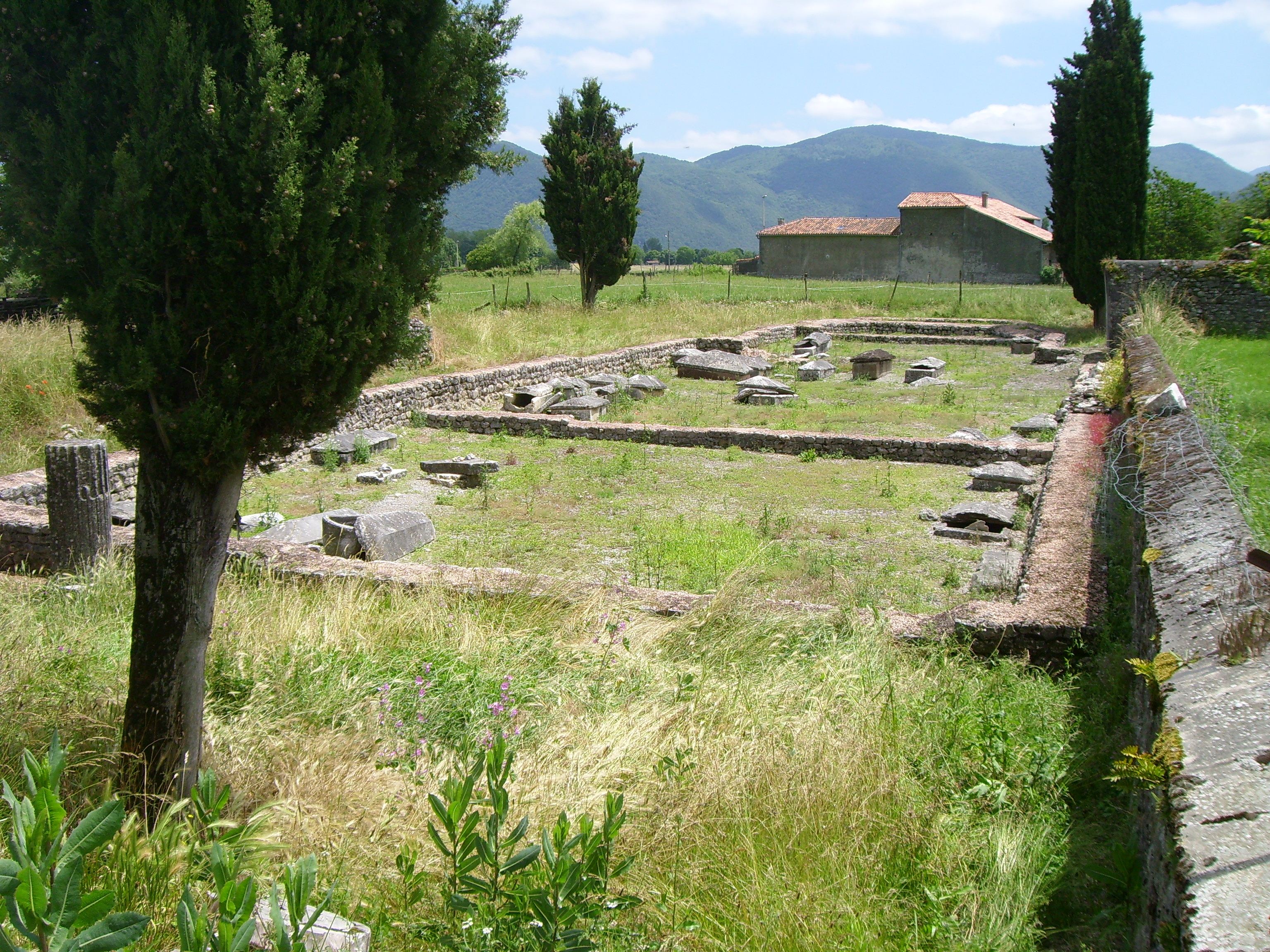 La basilique chrétienne de Lugdunum Convenarum (Saint-Bertrand-de-Comminges)